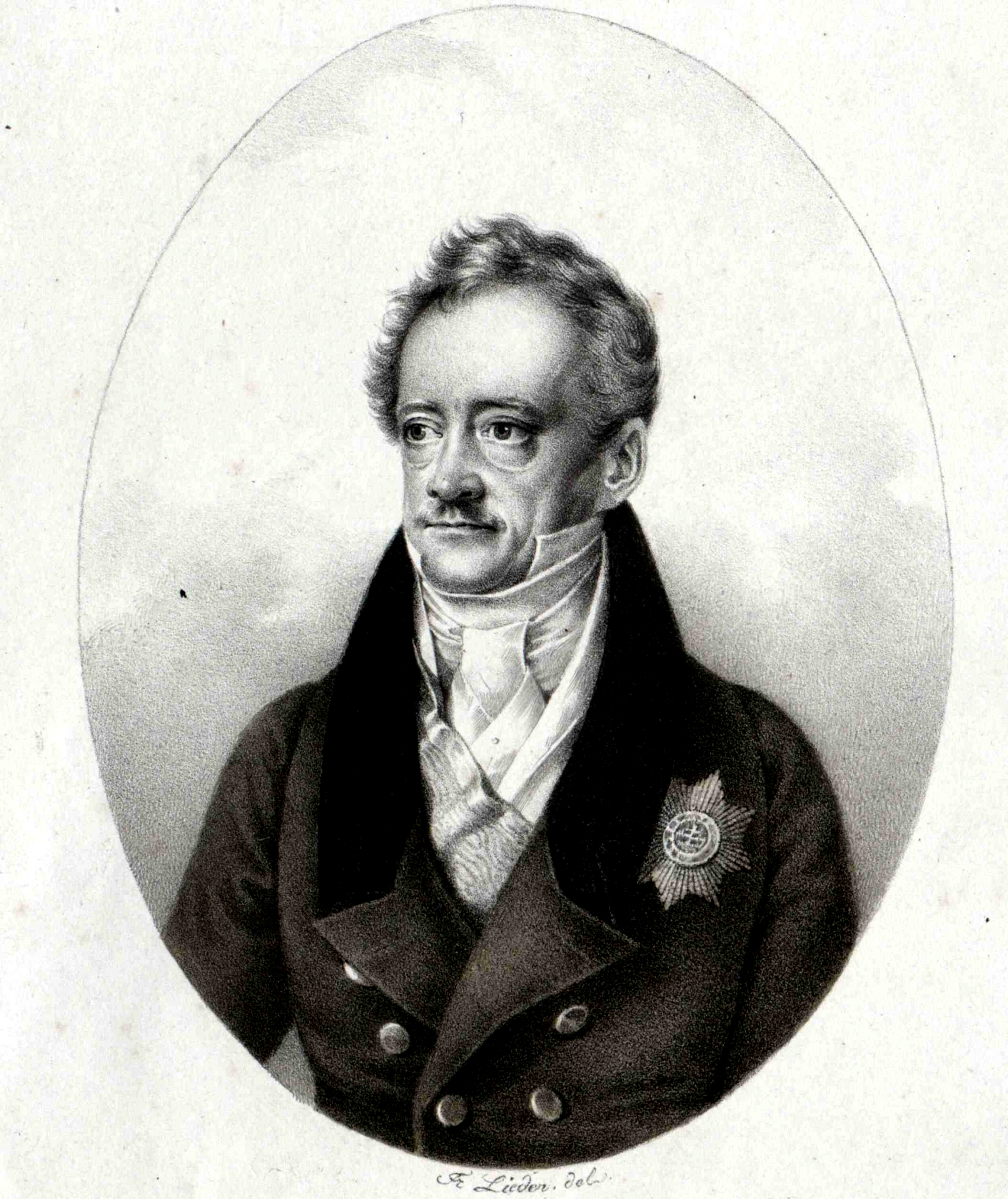 Gyaraki herceg Grassalkovich Antal, gyakori írásmóddal Grassalkovich III. Antal (Pozsony, 1771. szeptember 12. – Gödöllő, 1841. szeptember 9.) birodalmi herceg, királyi kamarás, aranygyapjas vitéz, Csongrád vármegye főispánja.